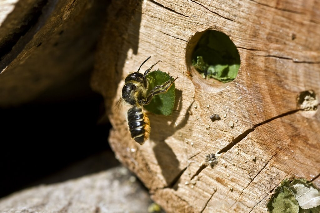 Blattschneiderbiene Megachile centuncularis beim Anflug auf ihr Nest